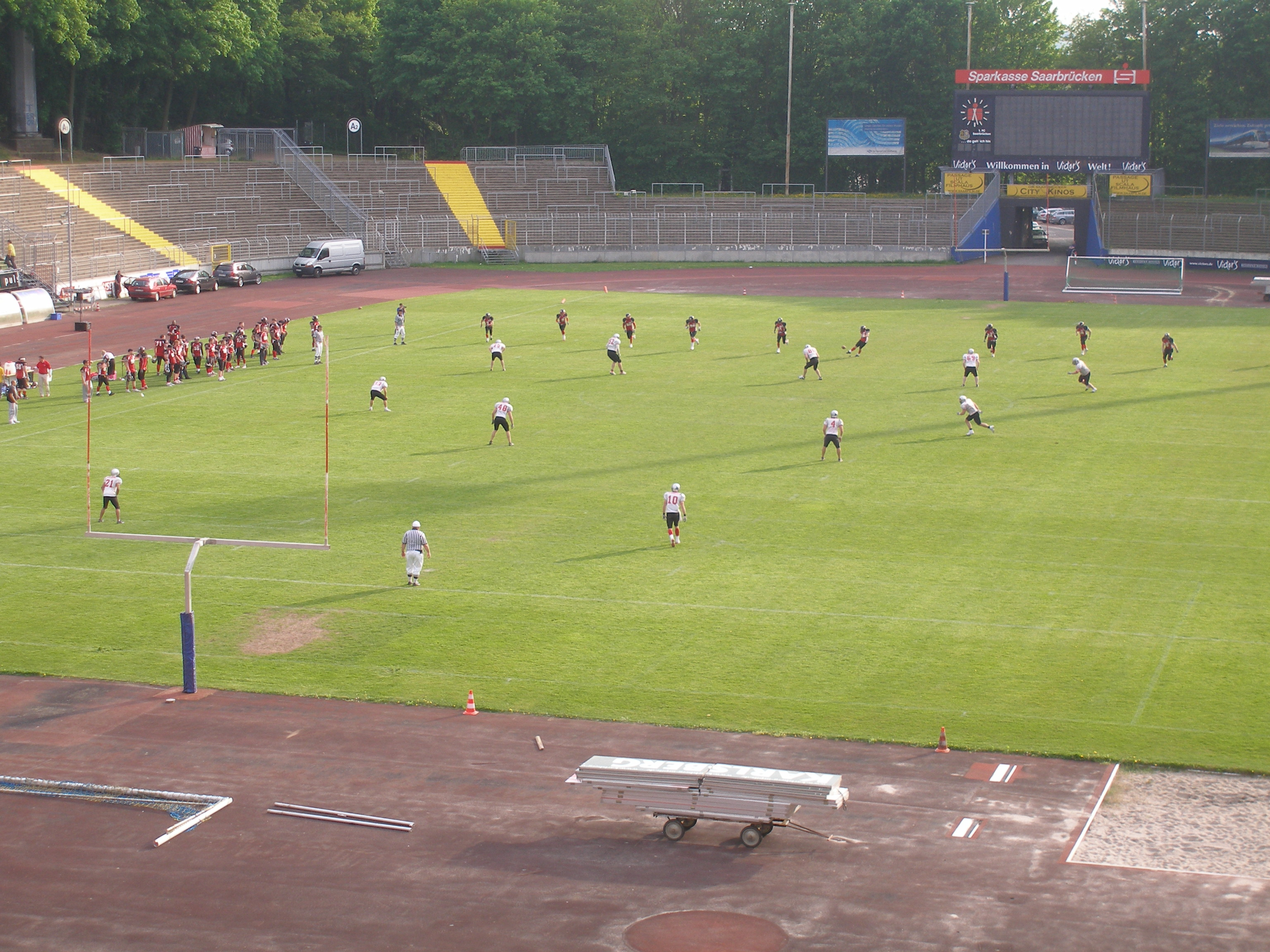 Kickoff im American Football. Szene aus dem GFL2-Spiel Saarland Hurricanes (rote Trikots) - Franken Knights (Weiße Trikots). Aufgenommen im Ludwigsparkstadion Saarbrücken.